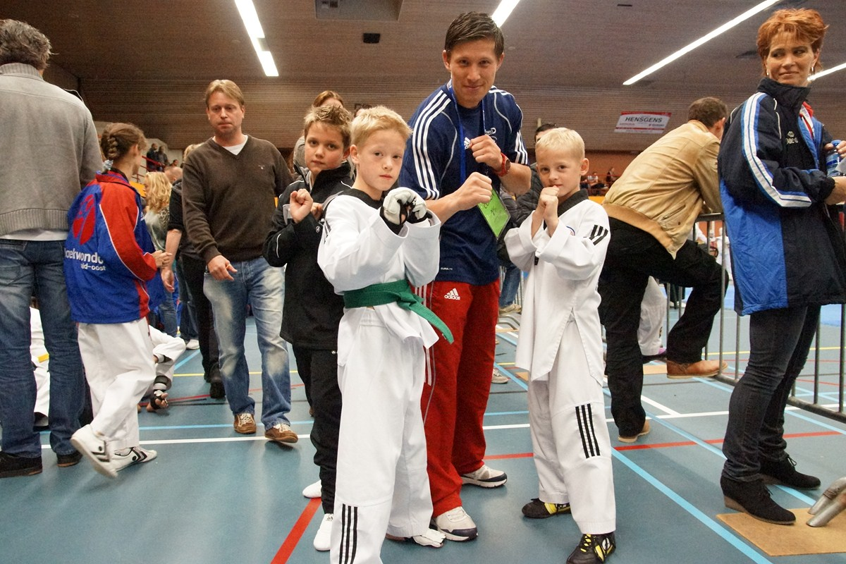 een foto van de taekwondoka Dennis Bekkers met enkele jeugdige fans.Tijdens Open Tapia 2012.